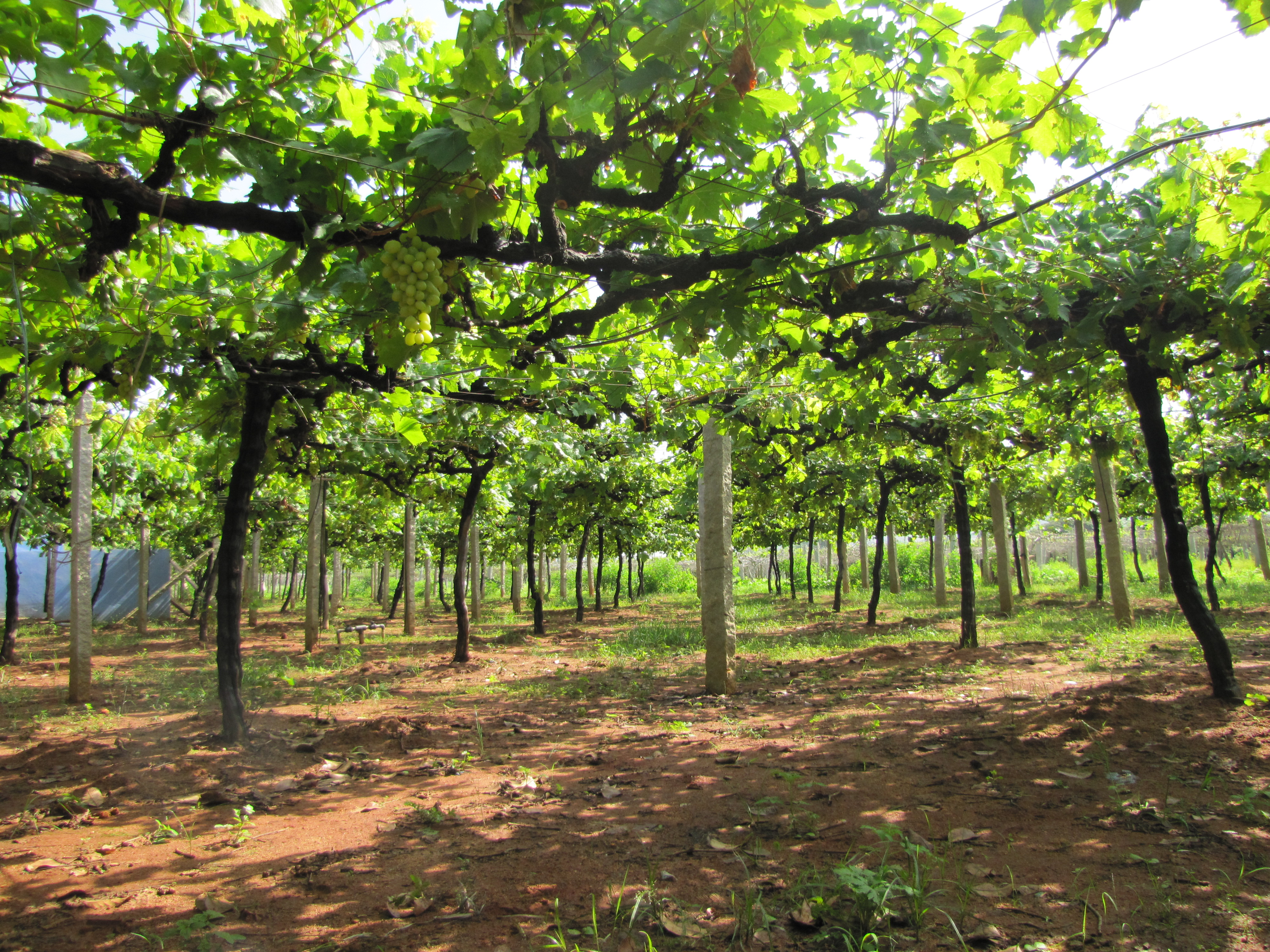 Grape Garden of Kerala, état indien situé au sud-ouest de la péninsule indienne